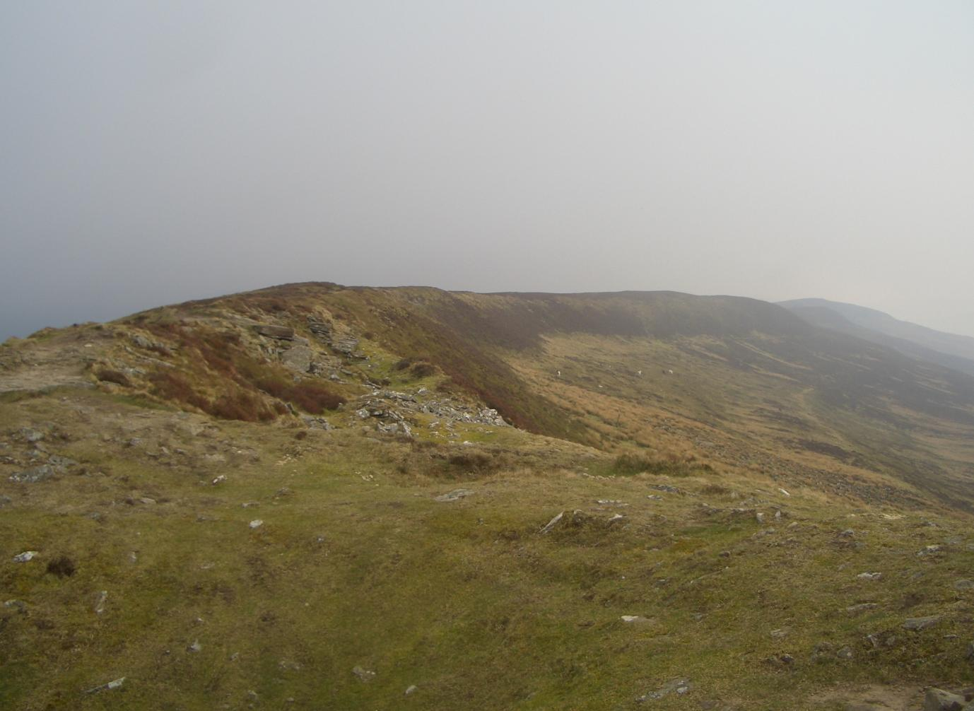 chwarel y fan